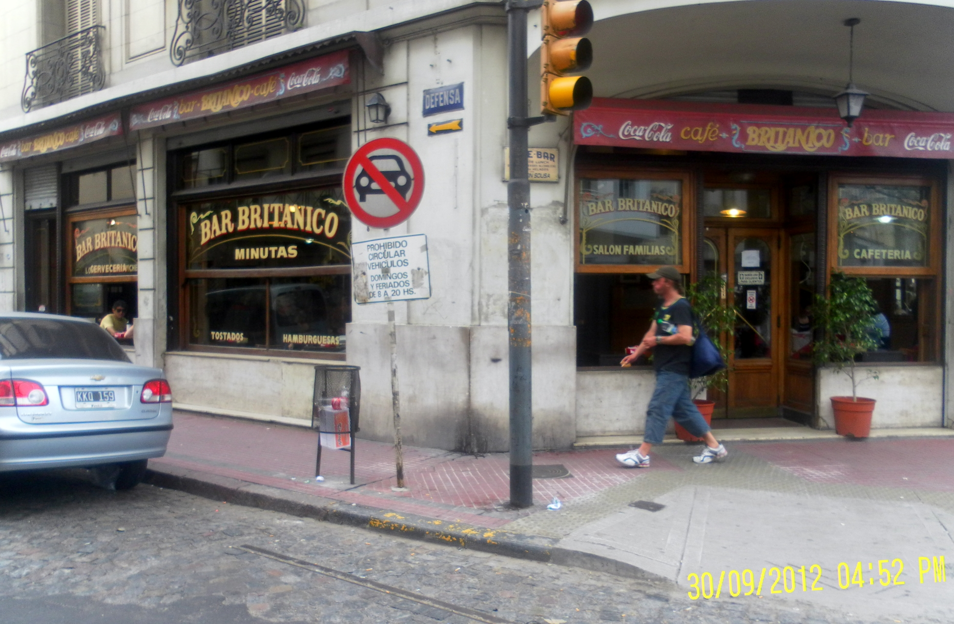 Bar Británico